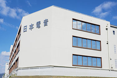 日本電音本社